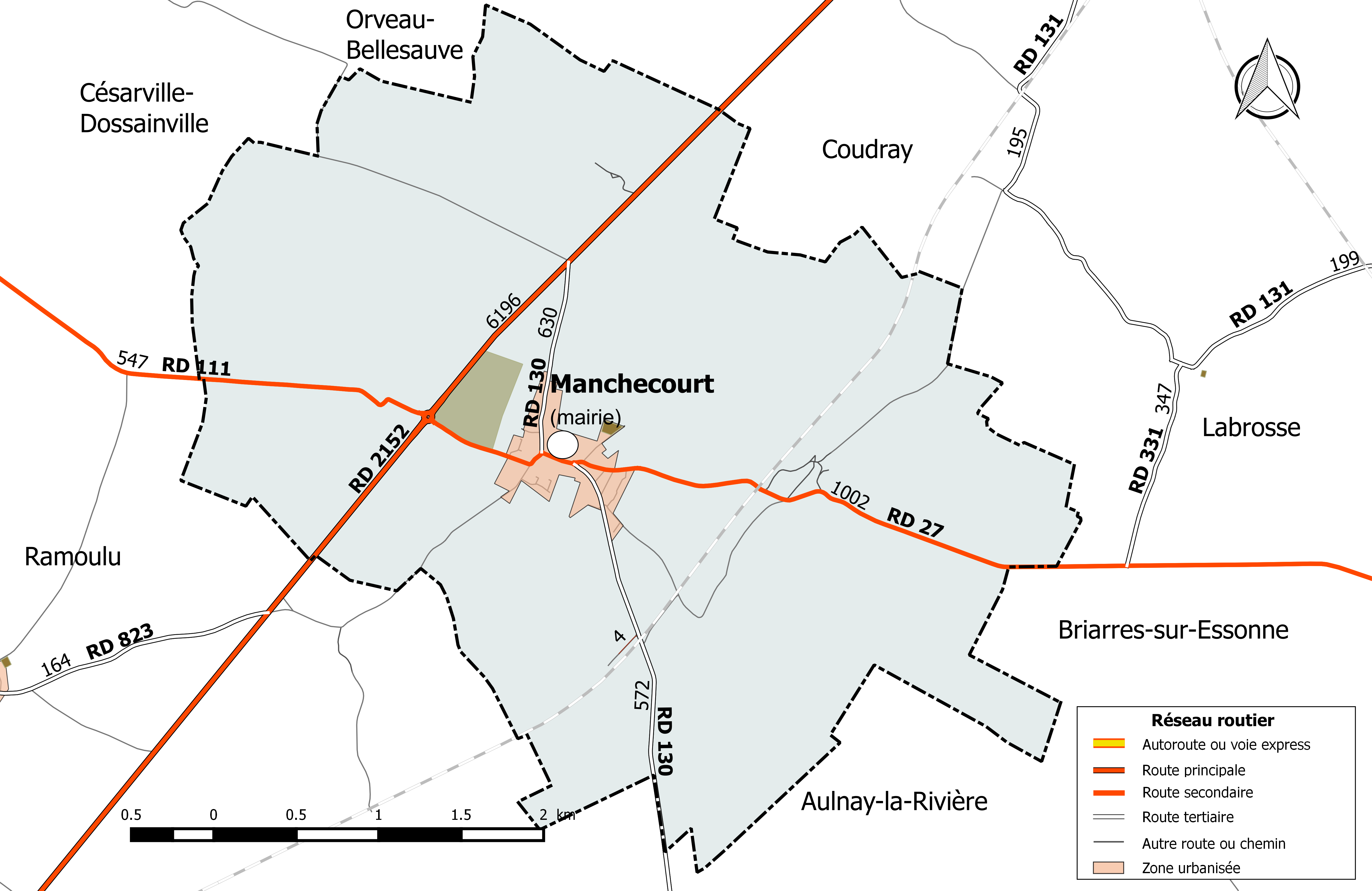 Carte du réseau routier de la commune de Manchecourt.